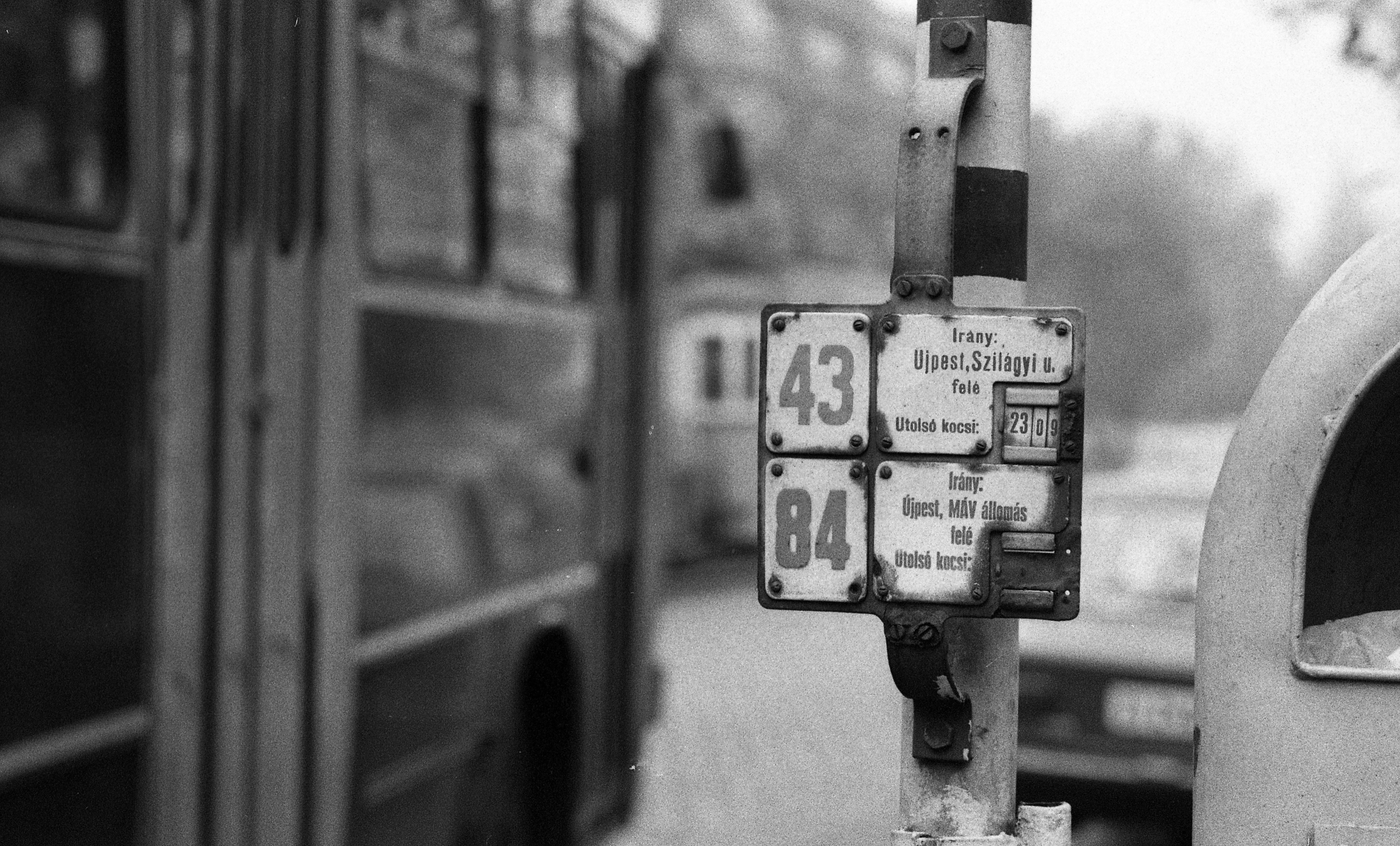 Váci út. Location: Hungary, Budapest XIII. Tags: Budapest Title: Váci út.